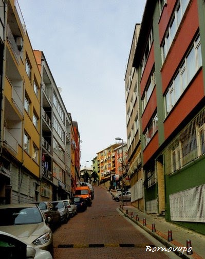 Serencebey